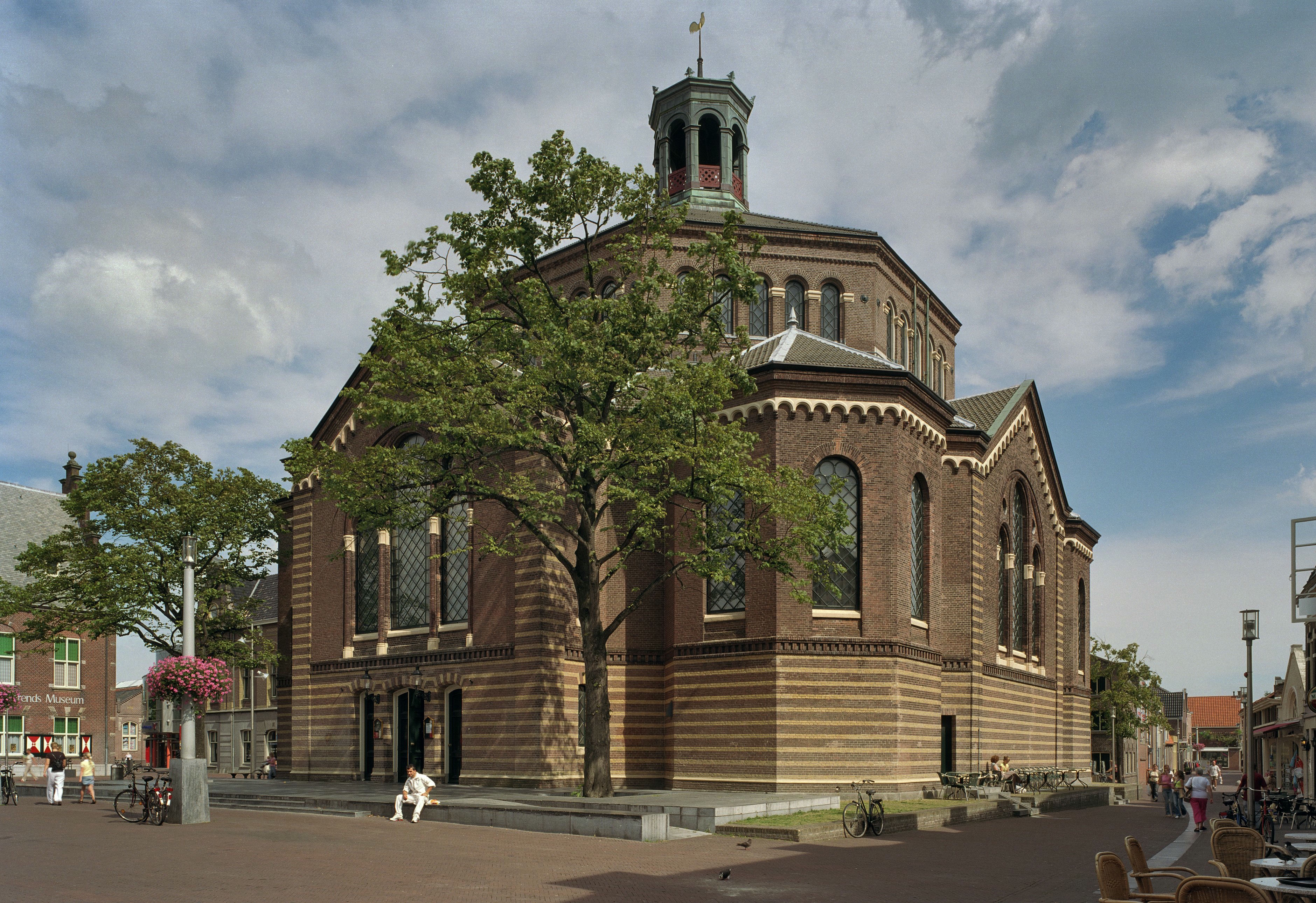 Hervormde Koepelkerk: Overzicht zuidwest zijde (opmerking: Boek: "66 Kanjermonumenten")